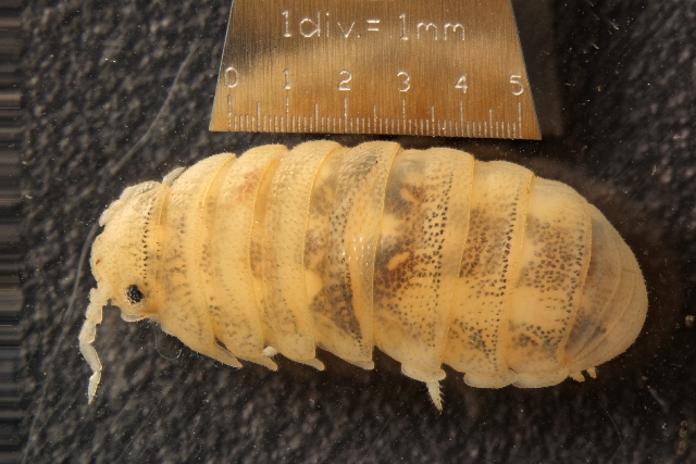 Tylos punctatus dorsal view